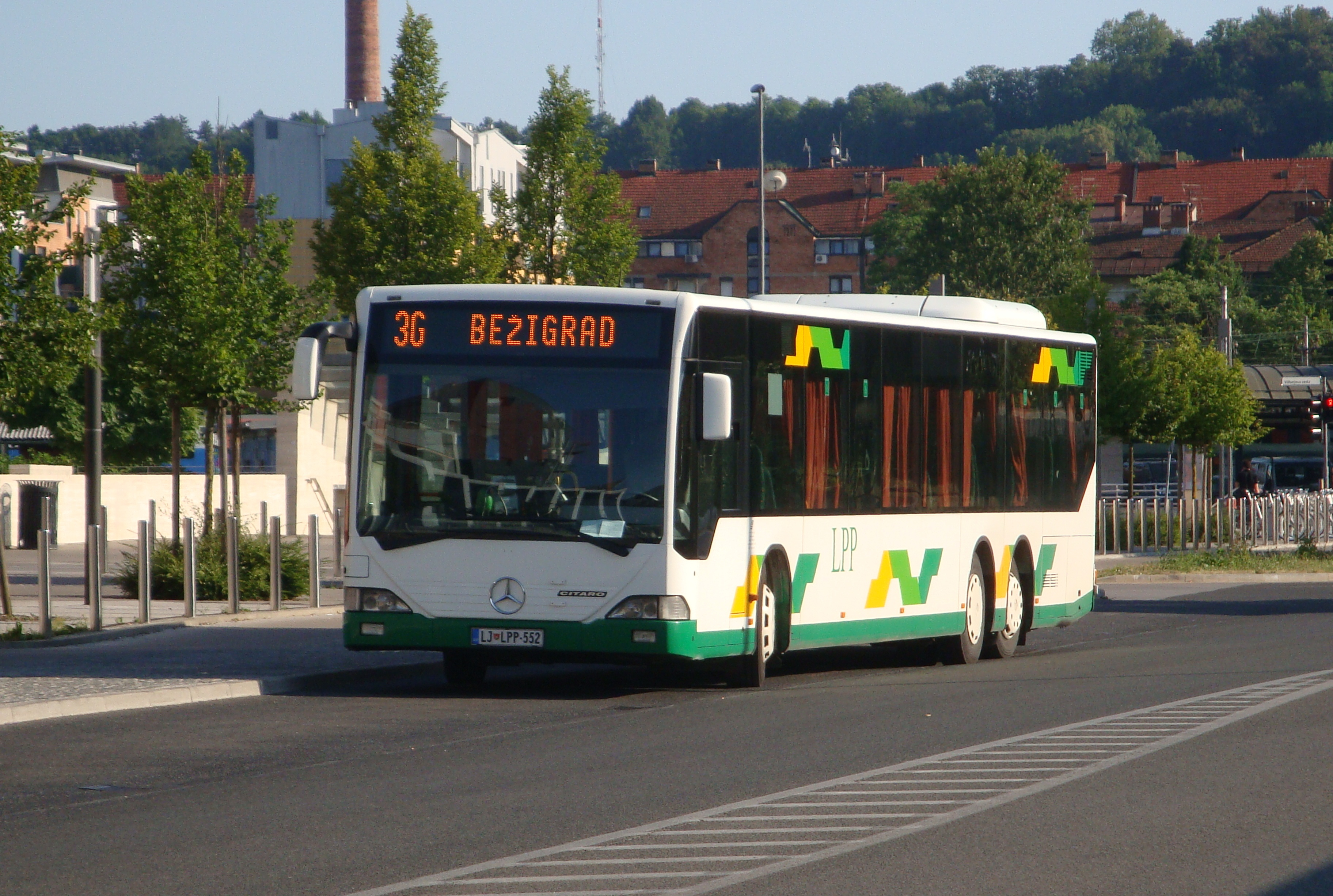 Avtobus LPP na liniji št. 3G po odhodu s postajališča Bežigrad na Železni cesti, Ljubljana, Slovenija